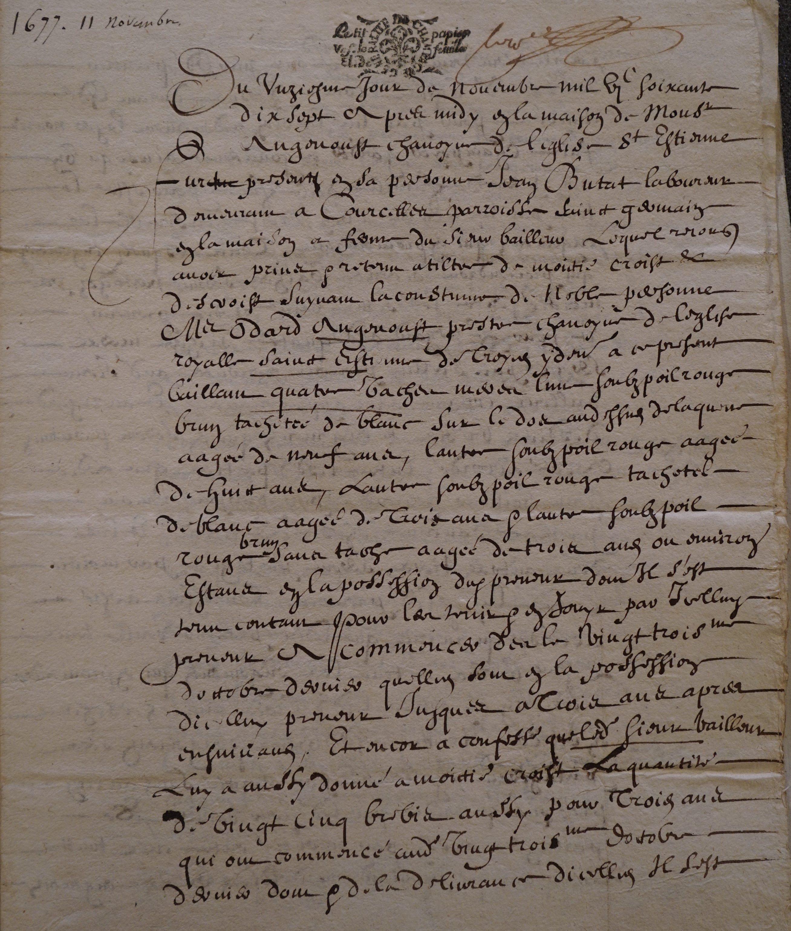 feuilles d'actes notariés de la famille Angenoust.